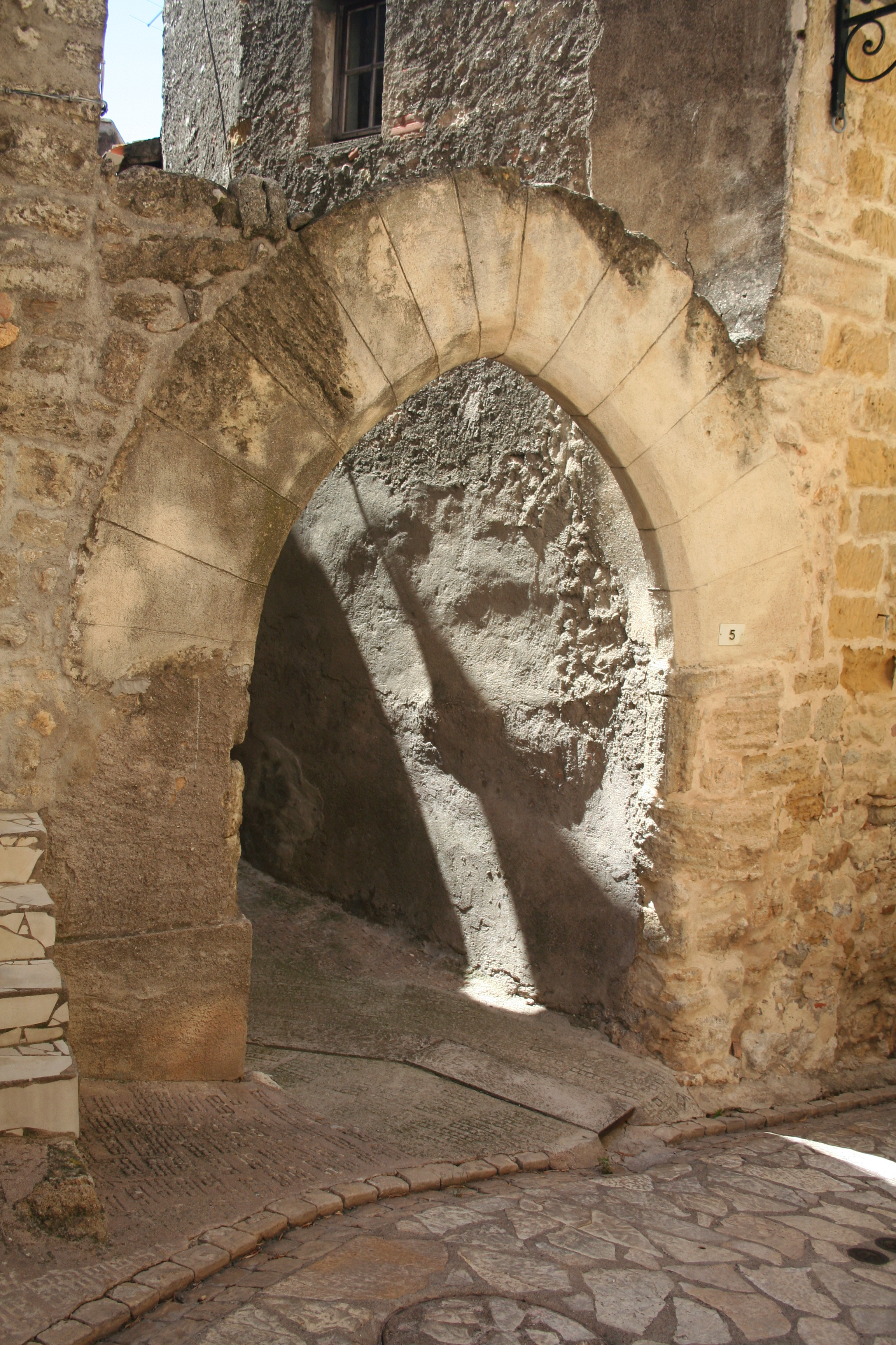 Abeilhan (Hérault) - porte ancienne.